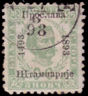 Коммеморативная марка Черногории